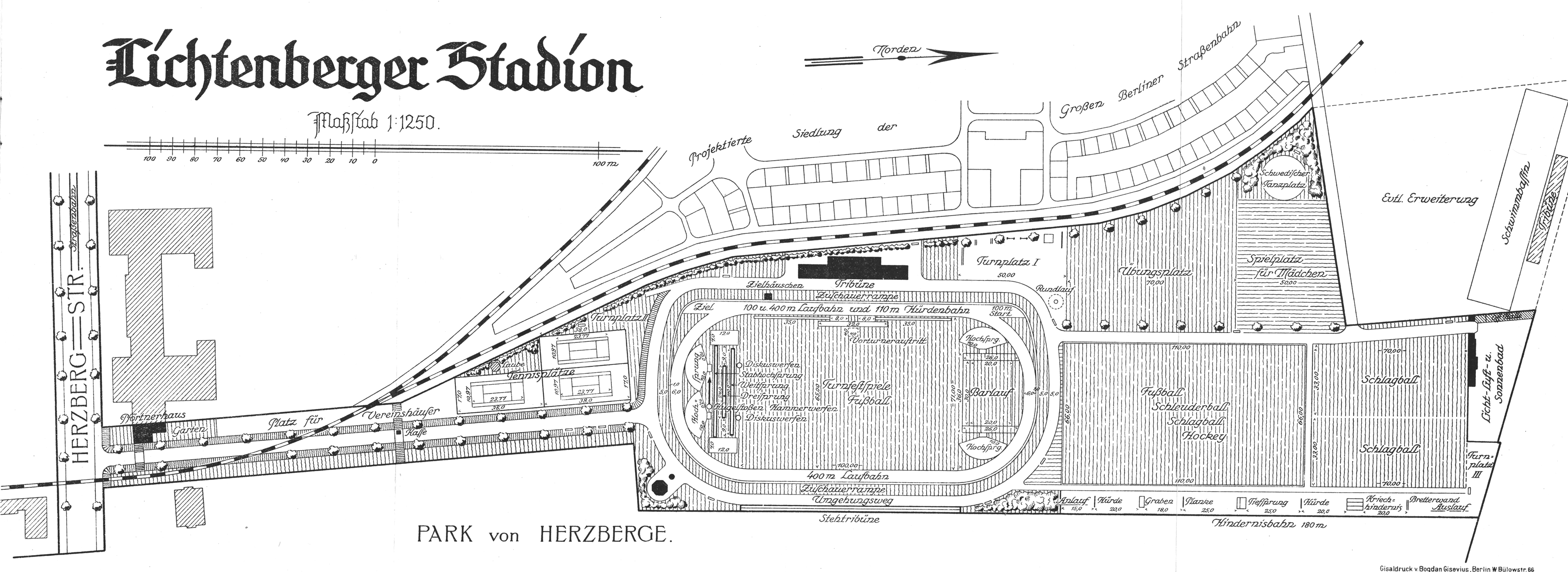 Plan des Lichtenberger Stadions an der Herzbergstraße, gebaut 1914 und 1919/1920, Architekt Rudolf Gleye.